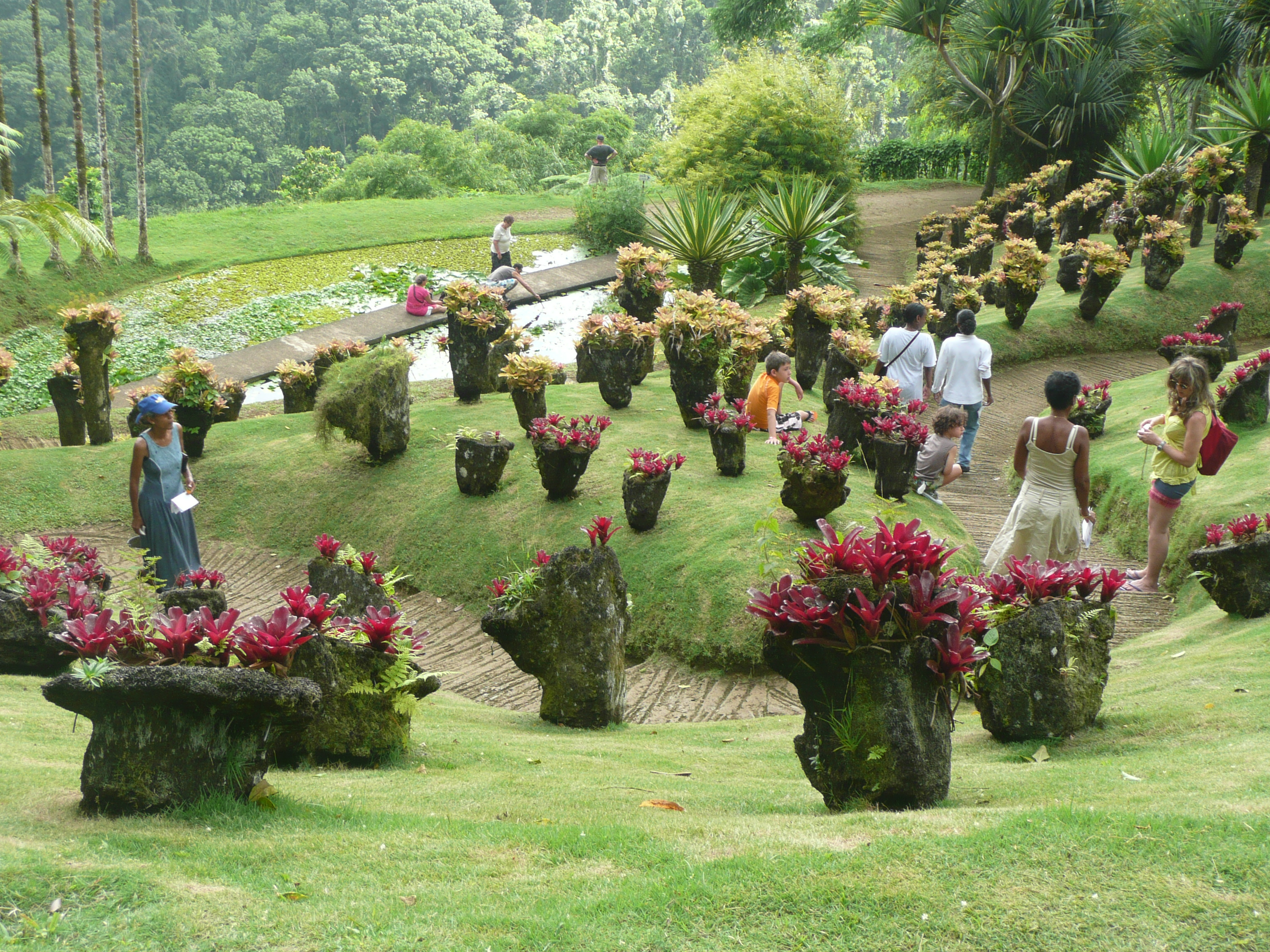 Ce sont des plantes grasses situées sur le parcours du Jardin de Balata.